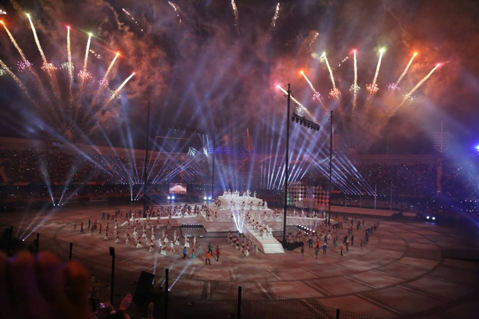 Juegos Centroamericanos Veracruz 2014